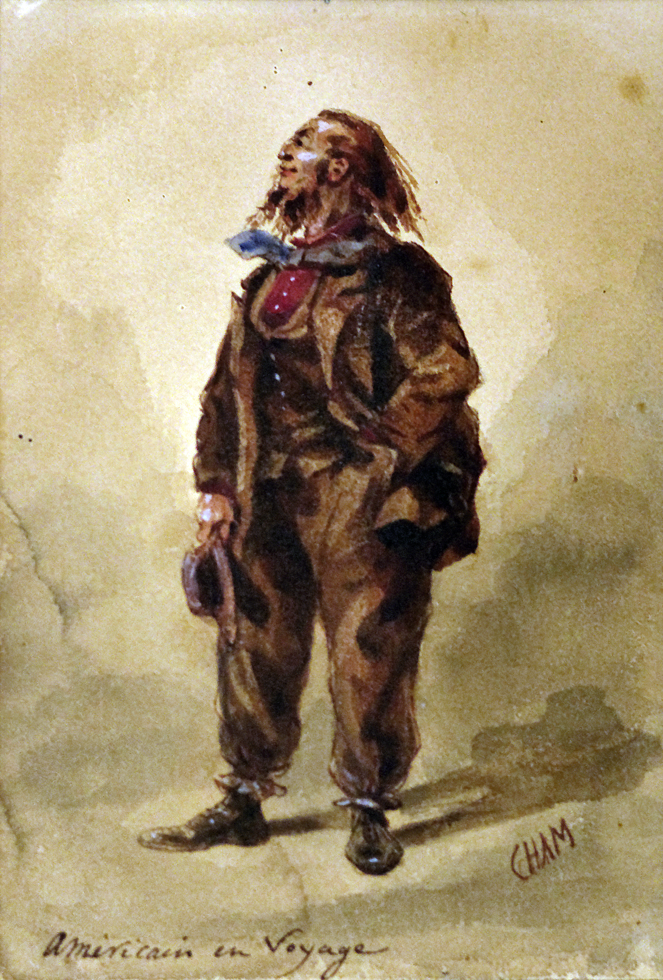 Américain en voyage, aquarelle d'Amédée de Noé (1819-1879) dit Cham, XIXe siècle. Inv A 748. Musée des Ursulines de Mâcon, legs Havard 1922.